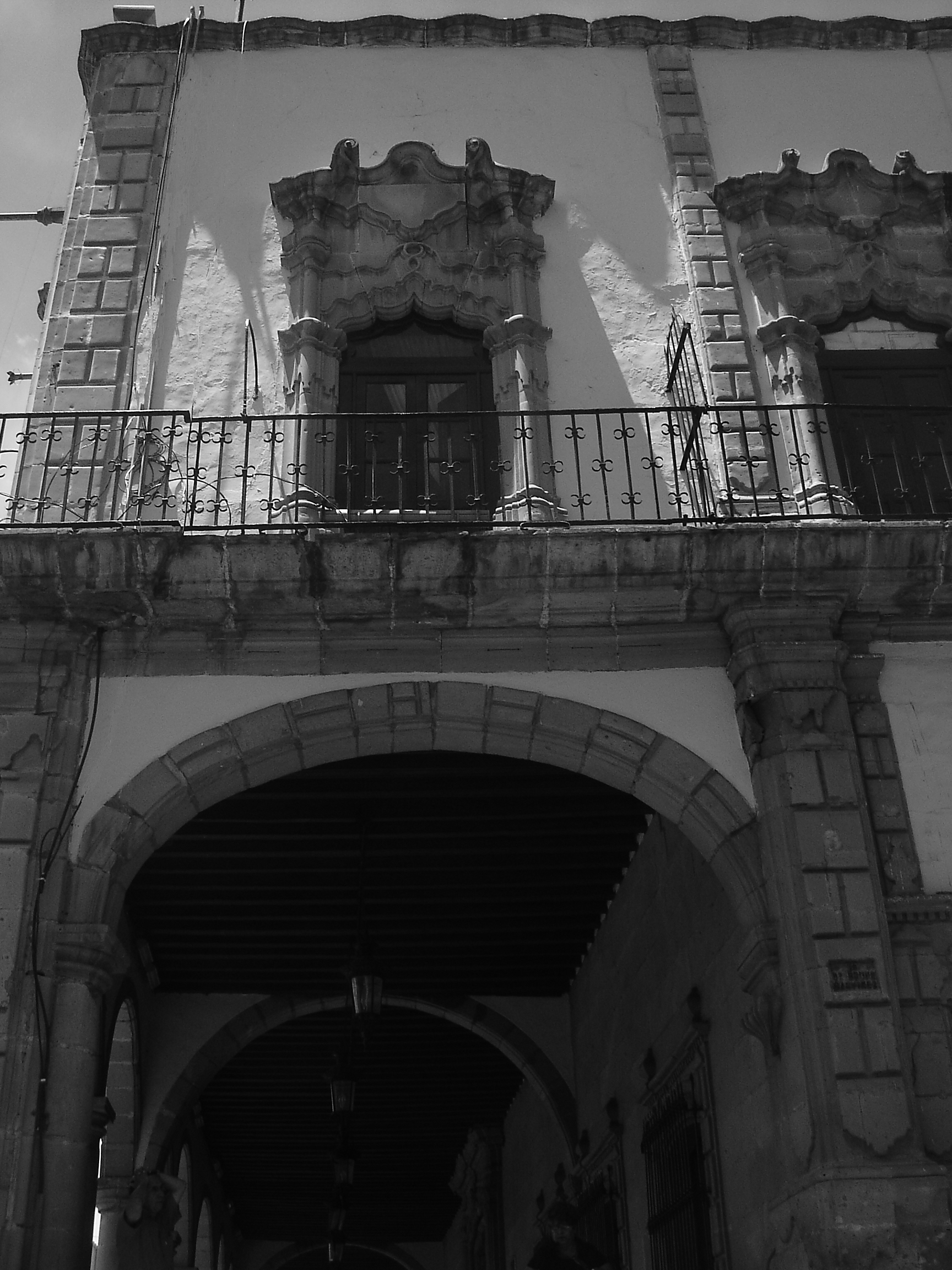 Vista oriental de un fragmento de la fachada del palacio de Zambrano en la ciudad de Durango.